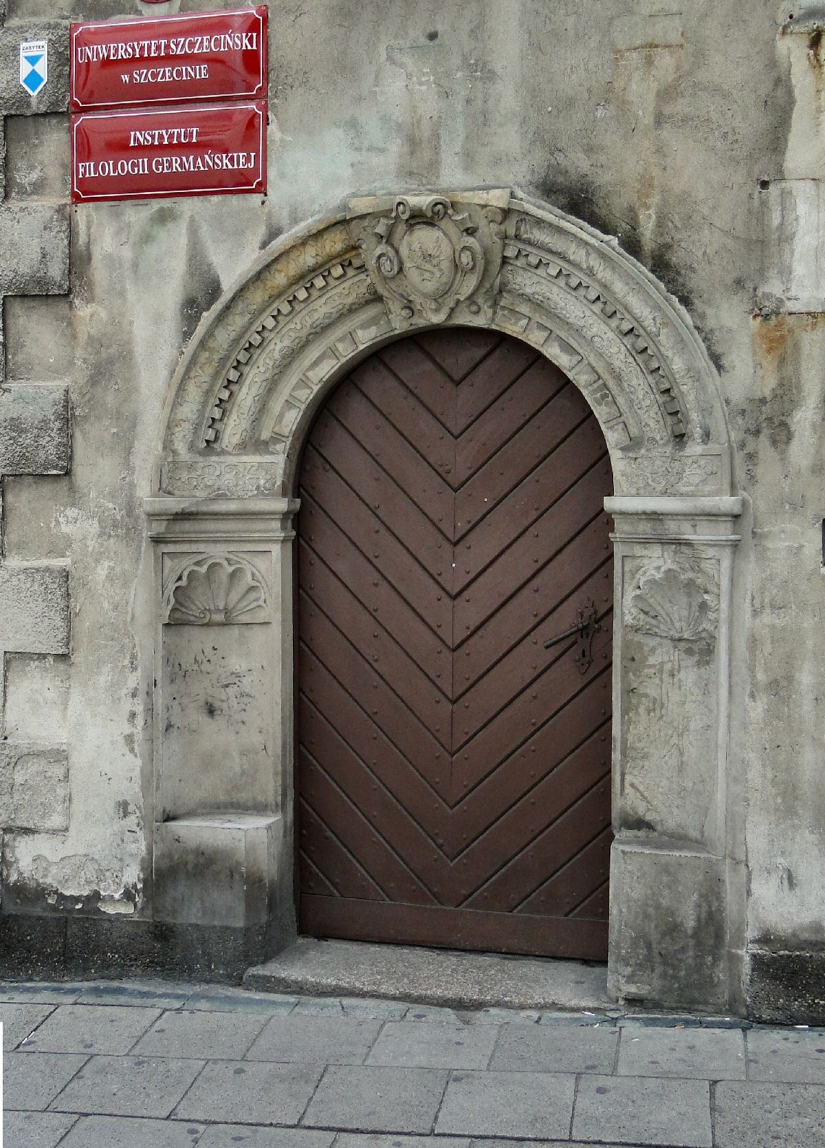 Stajnia Zamkowa (Książęca) w Szczecinie (zabytek nr rejestr. 30)